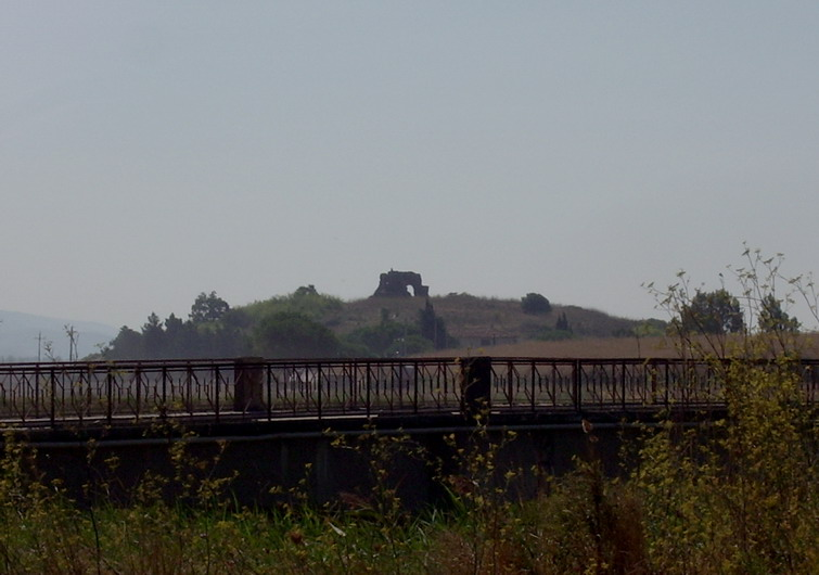 Ruderi Abbazia di San Pancrazio al Fango sull'Isola Clodia (Grosseto)